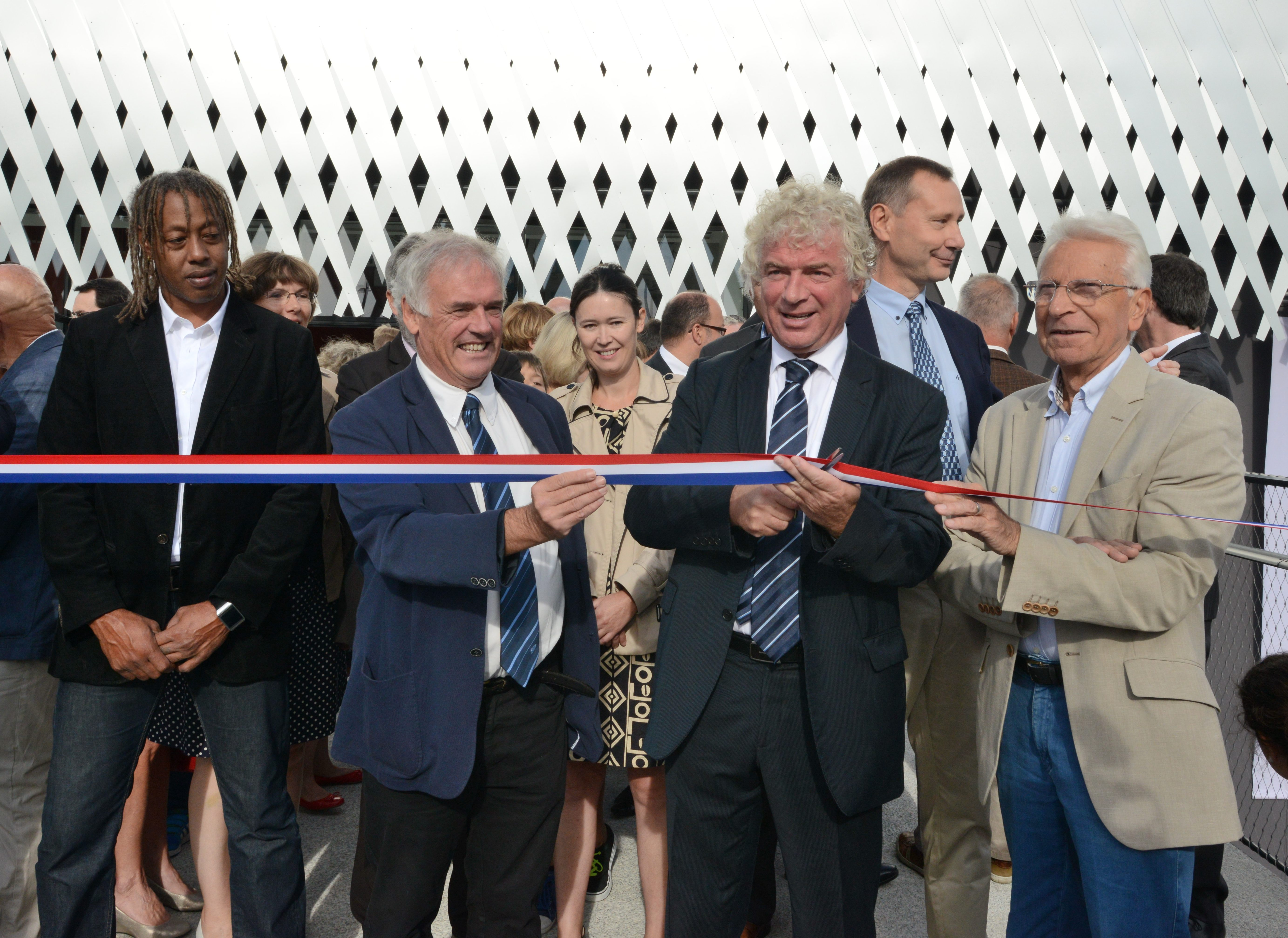 Inauguration de la salle sportive et événementielle de Brest, le 13 septembre 2014